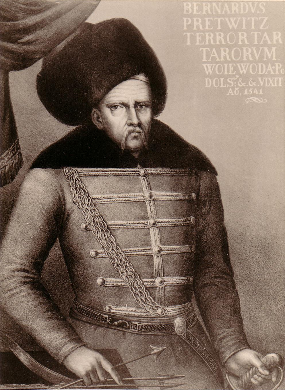 Bernhard von Prittwitz (+ 1561), der Schrecken der Tartaren ("Terror Tartarorum") im Jahr 1541